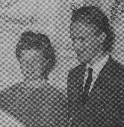 Arktiekterna Ingegerd (född Snis) & Lars Ågren